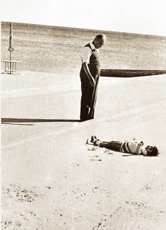 Atatürk manevi kızı Ülkü Adatepe ile, Florya, İstanbul, 12 Eylül 1936